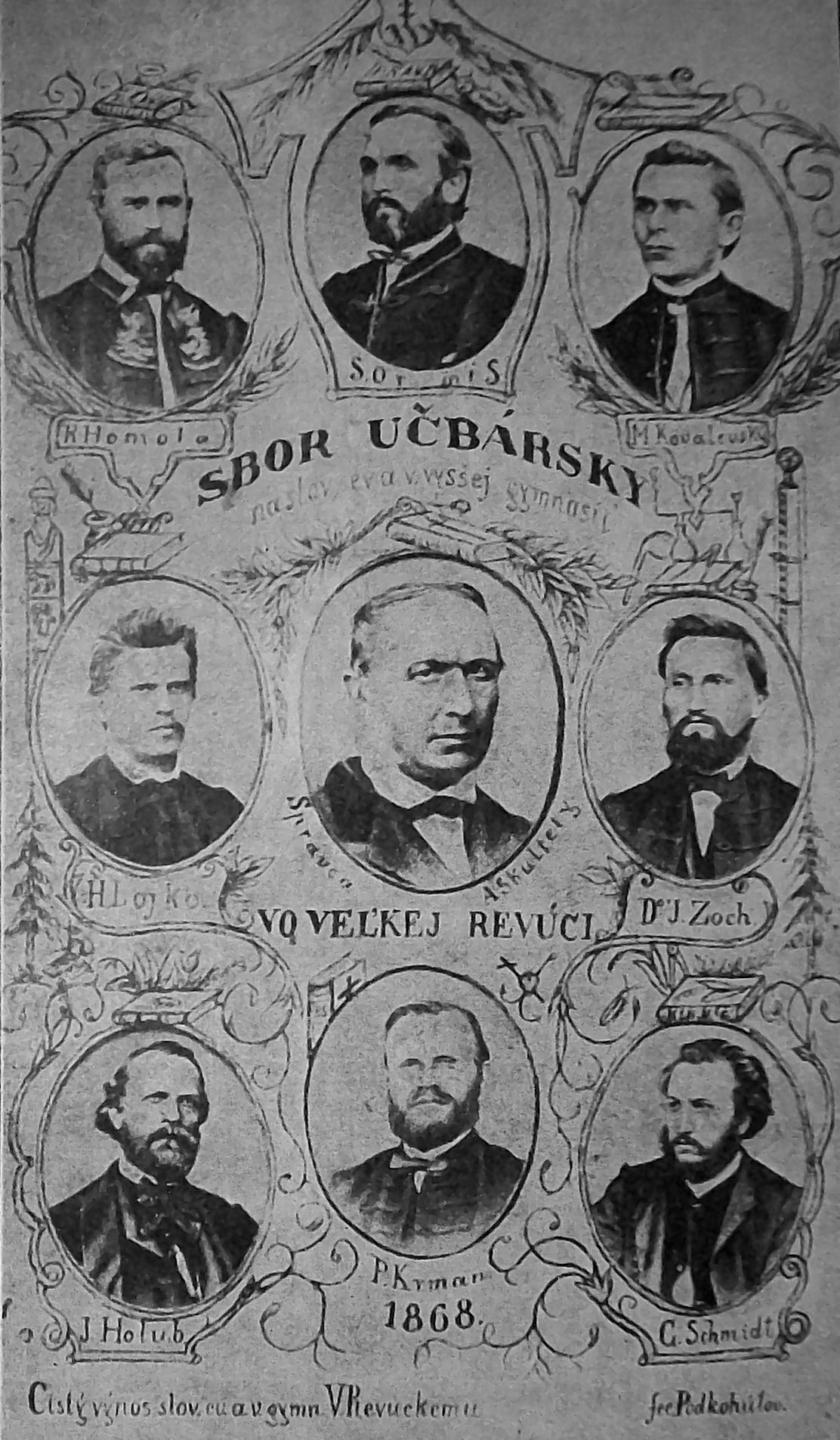 August H. Škultéty a profesorský zbor slovenského evanjelického gymnázia v Revúcej z roku 1868.